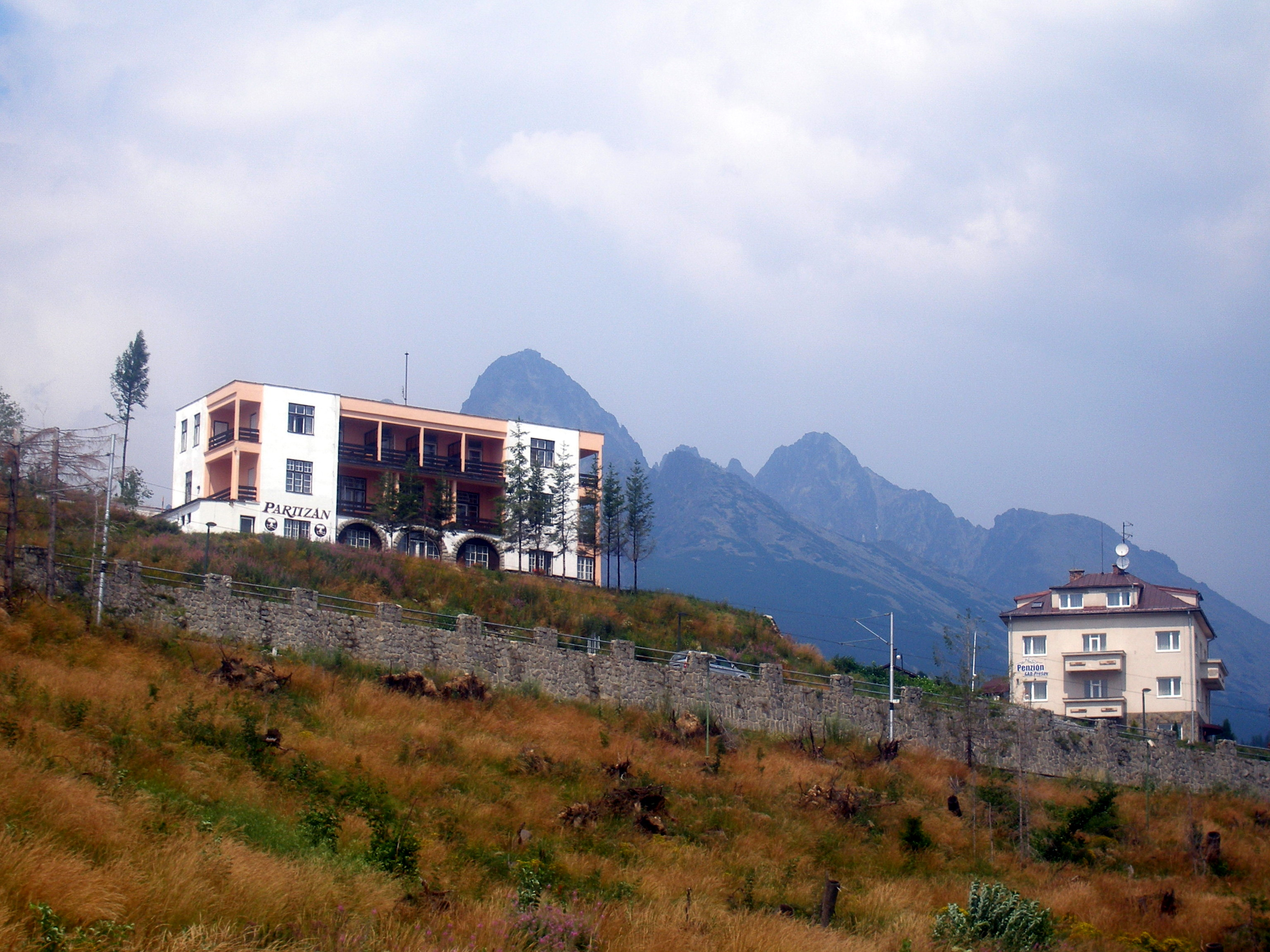 Osada Horný Smokovec